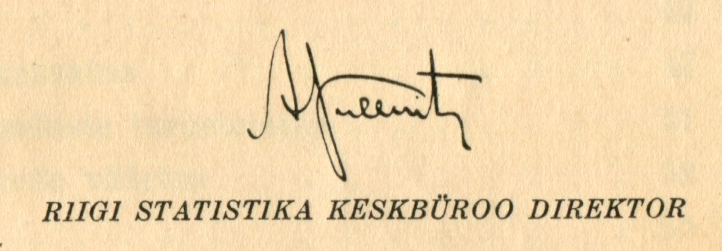 Albert Pulleritsu autogramm Riigi Statistika Keskbüroo väljaandel "Eesti arvudes. 1934. a. rahvaloenduse mälestuseks. Tallinn 1934"